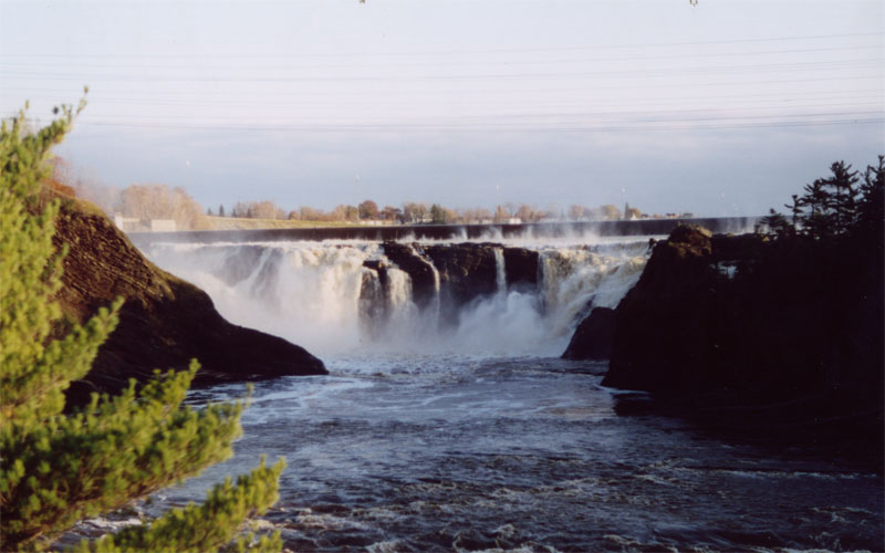 Les chutes de la rivière Chaudière vu de la passerelle du parc des Chutes de la Chaudière.